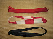 柔道で定められた帯の色々